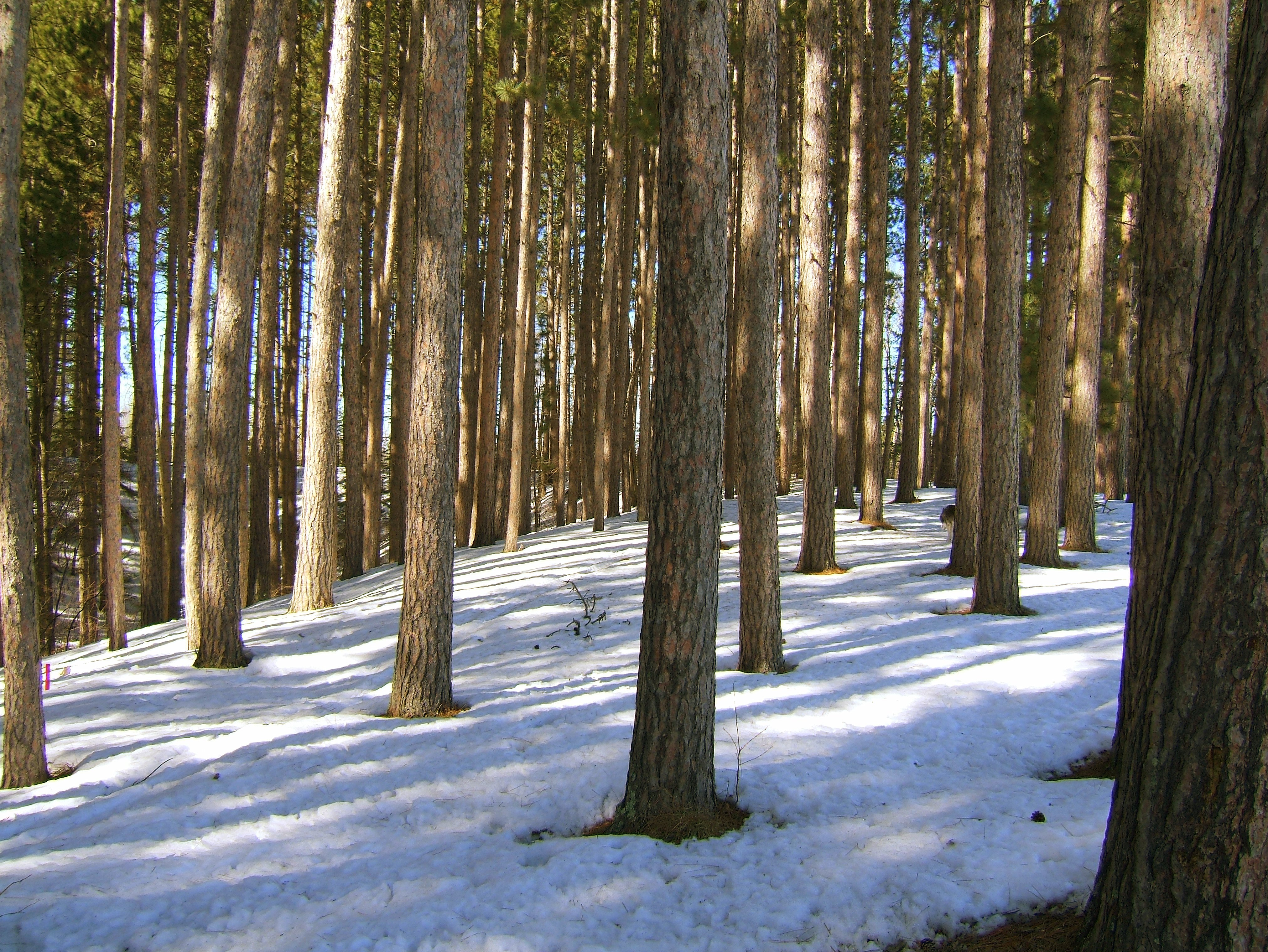 Red Pine Pinus resinosa, Minnesota